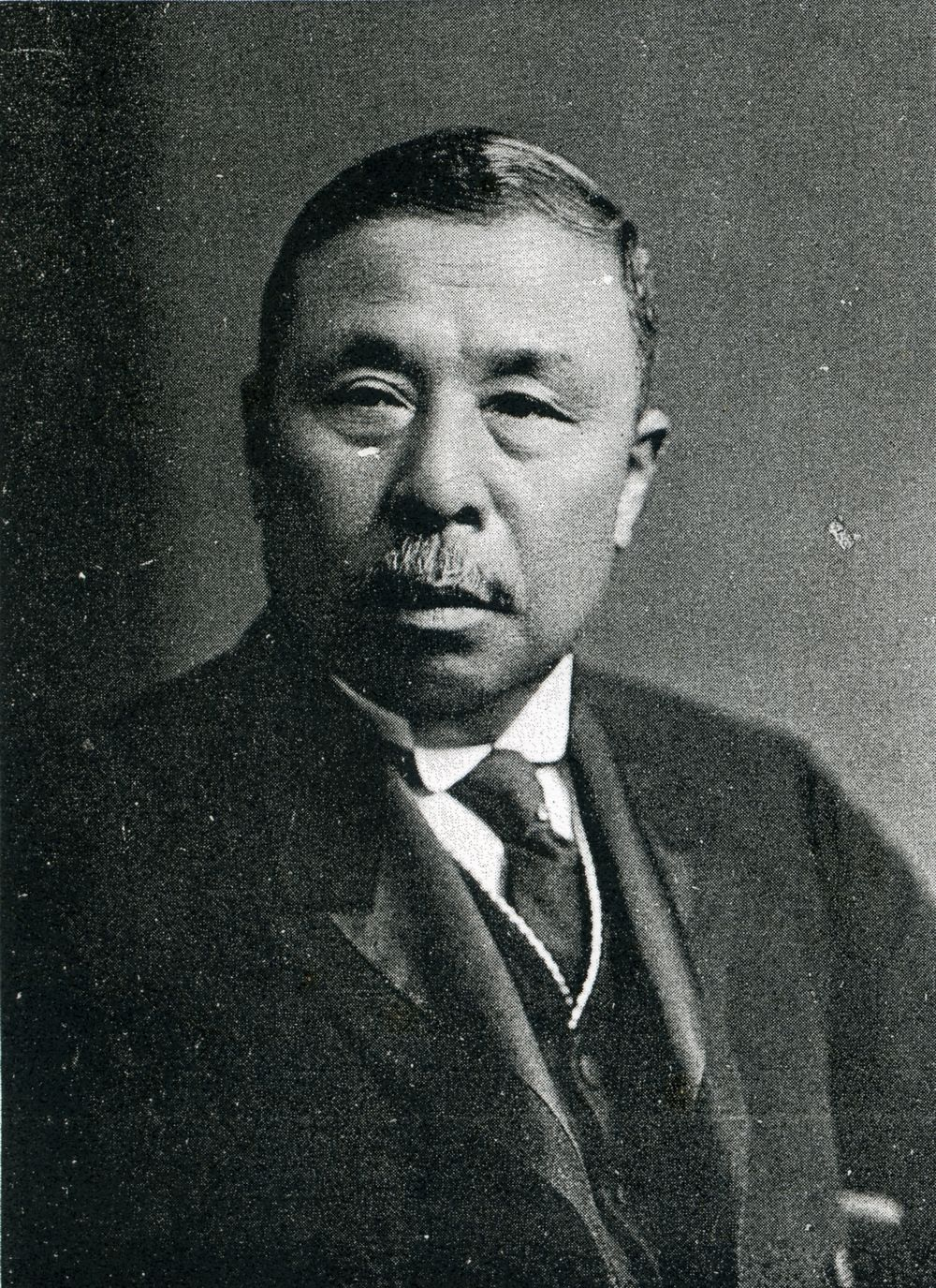 この写真は、小泉又次郎（1865-1951）の写真です。